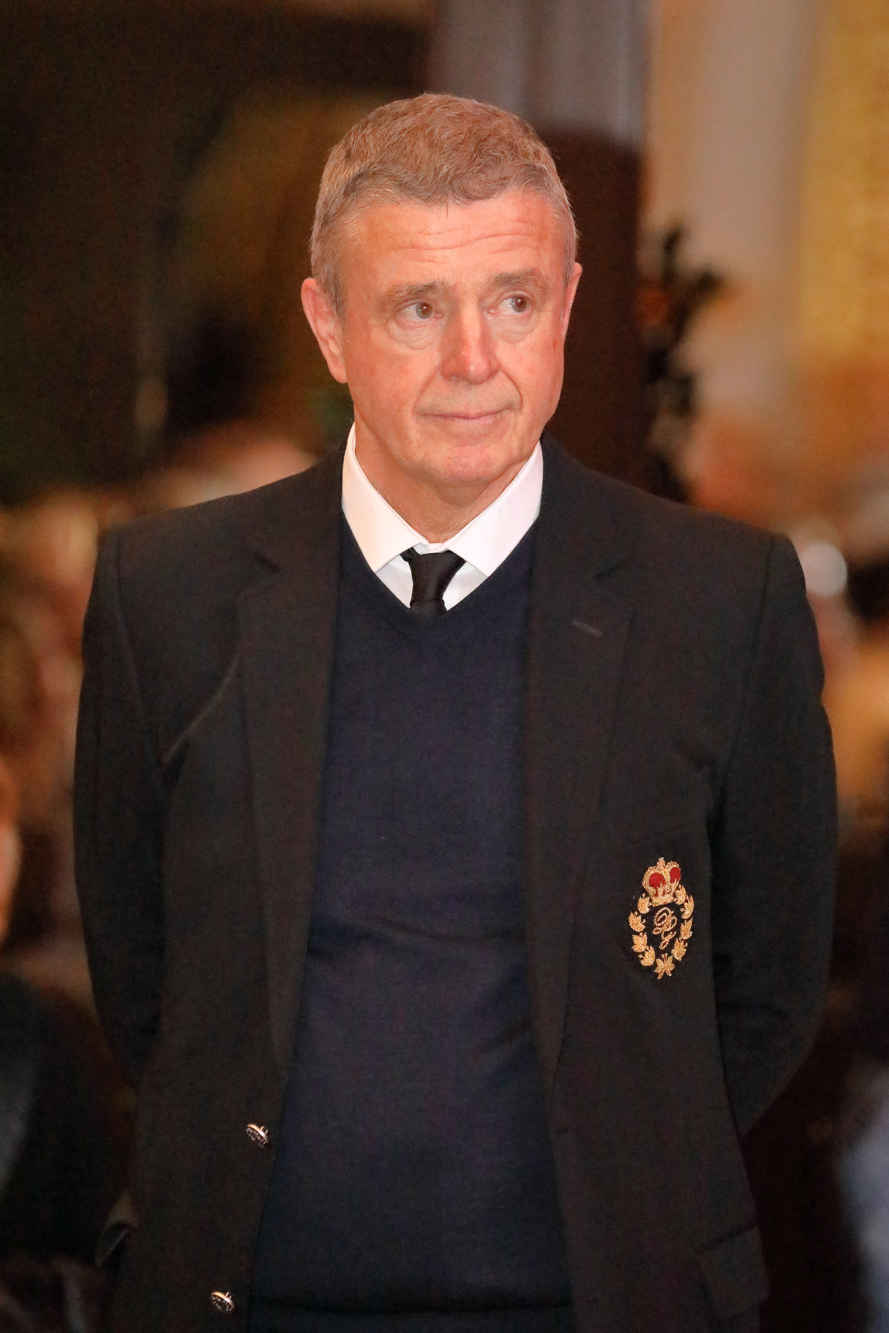 Der österreichische DAÖ-Pressemanager und Ex-FPÖ-Politiker Gernot Rumpold beim ersten DAÖ-Neujahrstreffen in den Sofiensälen im 3. Wiener Gemeindebezirk Landstraße.